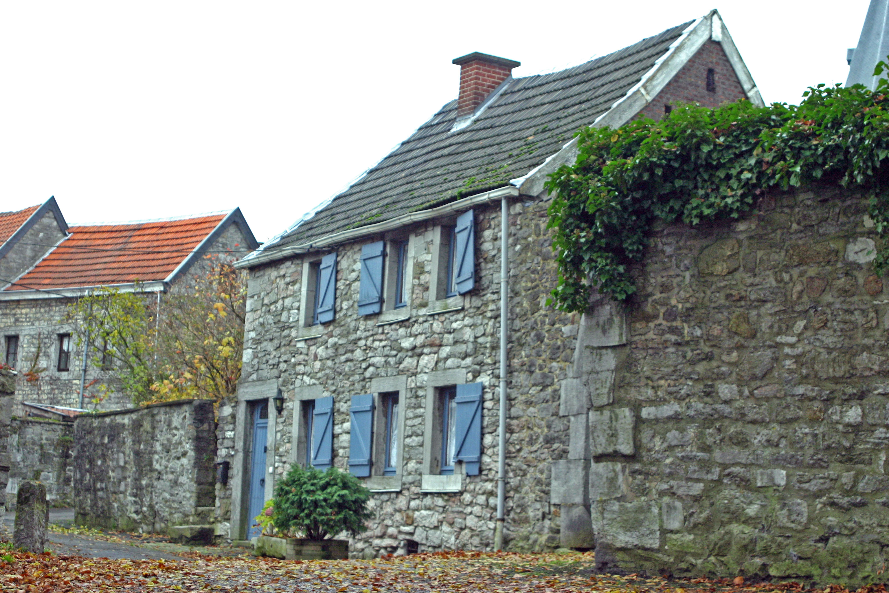 Limbourg Gäassel. Kategorie:Uertschaften an der Provënz Léck